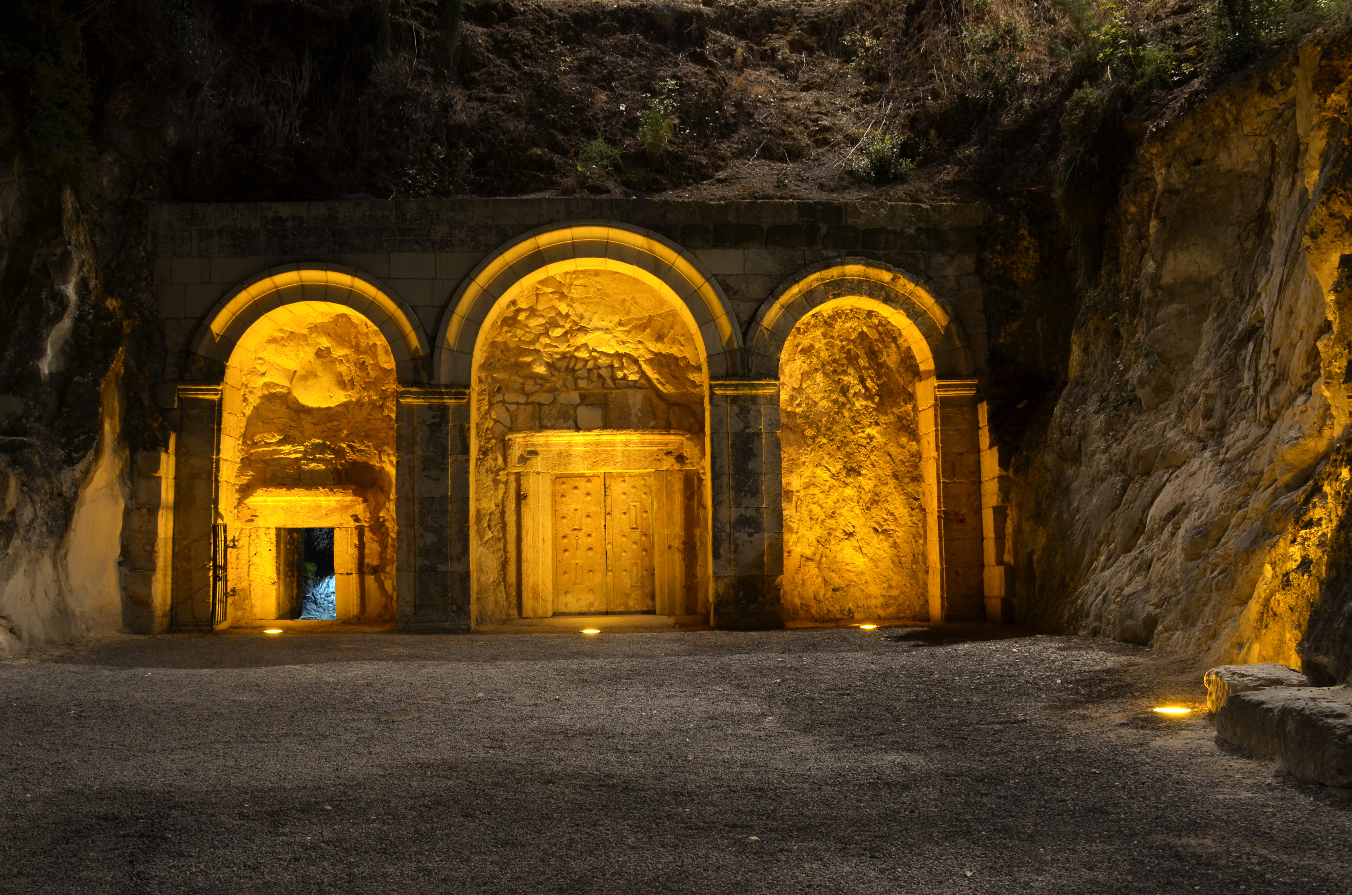 בית שערים הוא אתר ארכאולוגי השוכן בגליל התחתון. במקום התקיים יישוב יהודי חשוב בתקופת בית שני, המשנה והתלמוד. שיא פריחת היישוב הייתה בין המאות ה-2 וה-4 לספירה, עת שהתה בה הסנהדרין בראשותו של רבי יהודה הנשיא. בית שערים הקדומה ממוקמת על גבעת שייח' אבריק ליד קריית טבעון של ימינו. הגבעה נמצאת על אחת מהשלוחות הדרומיות של הגליל התחתון וניתן להשקיף ממנה על עמק יזרעאל מדרום-מזרח ועל הר הכרמל ממערב.